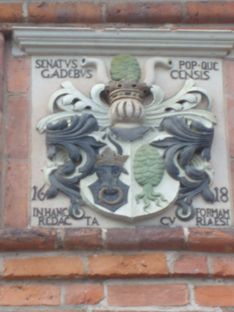 Historisches Wappen-Relief an der Fassade des Rathauses der Stadt Gadebusch in Mecklenburg aus dem Jahr der Neugestaltung (1618) - (Detail)